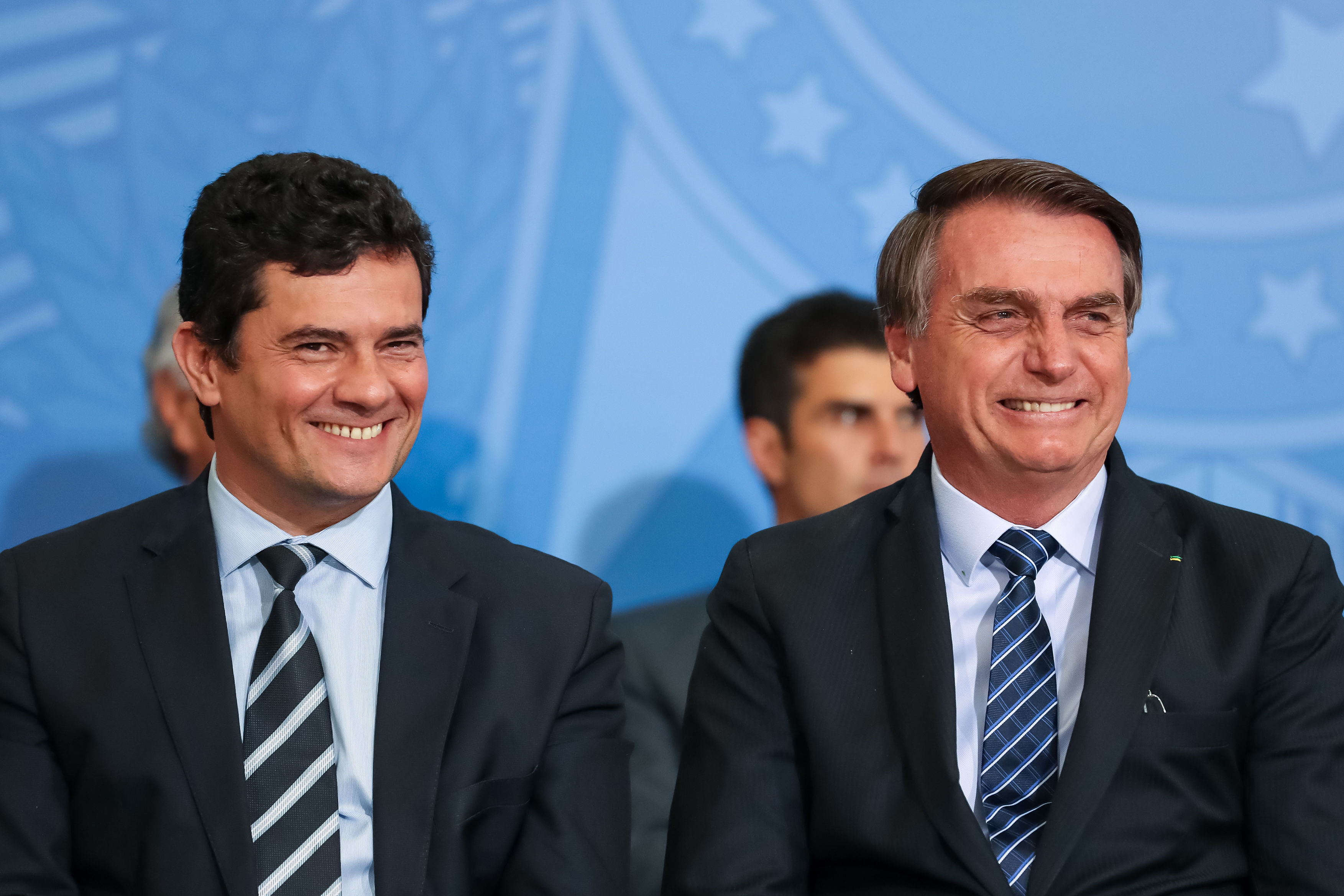 (Brasília - DF, 29/08/2019) Solenidade de Lançamento do Projeto em Frente Brasil. Foto: Marcos Corrêa/PR